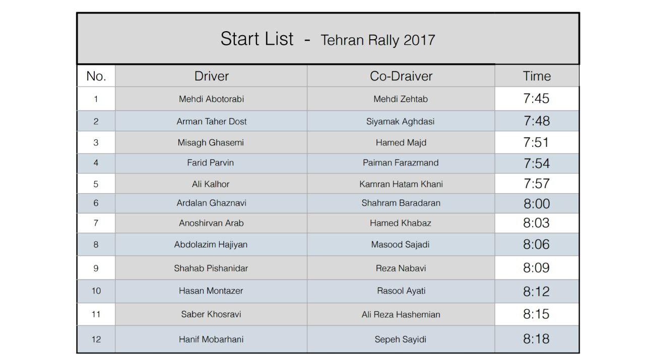 نمونه استارت لیست رالی قهرمانی کشور 1396